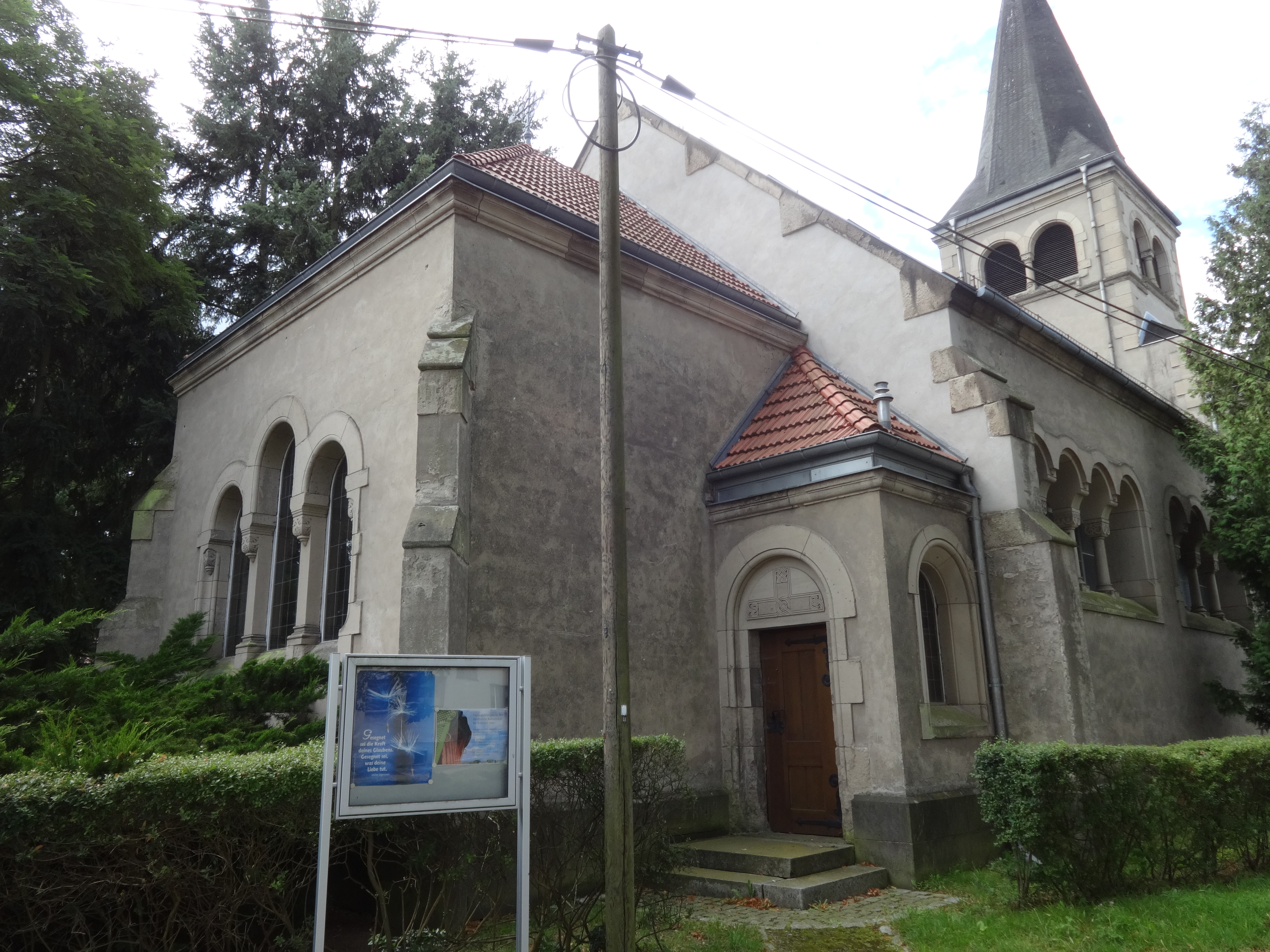 Die Dorfkirche Kerzendorf ist eine neuromanische Saalkirche, die in den Jahren 1896 bis 1898 auf Initiative von Paul von Schwabach nach Plänen des Architekten Karl Hoffacker entstand. Die Kirchenausstattung ging nach dem Zweiten Weltkrieg weitgehend verloren.